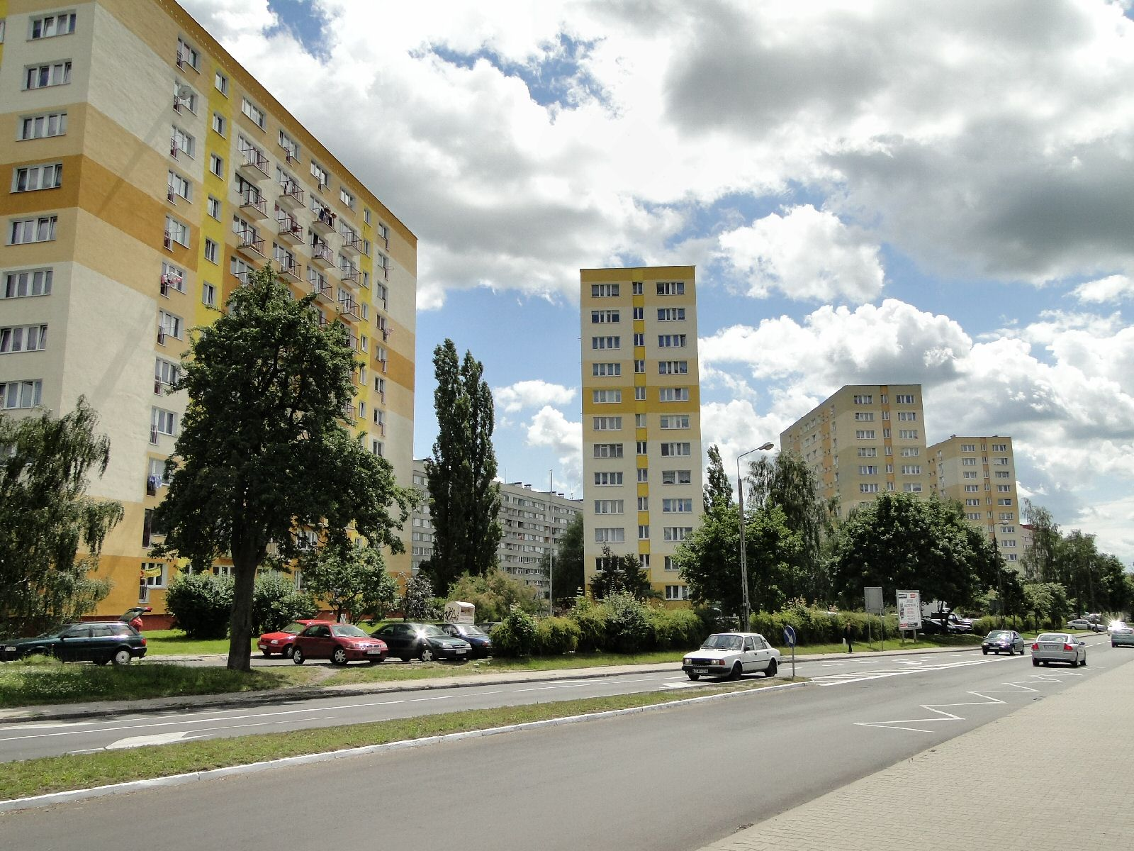 Osiedle Kaliny w Szczecinie